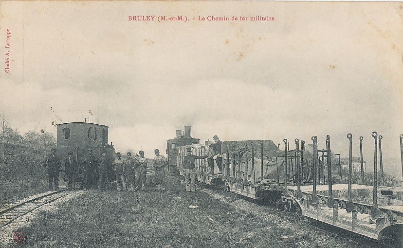 Military Péchot-Bourdon locomotive and another narrow gauge steam locomotive in Bruley in the Meurthe-et-Moselle department in northeastern France.